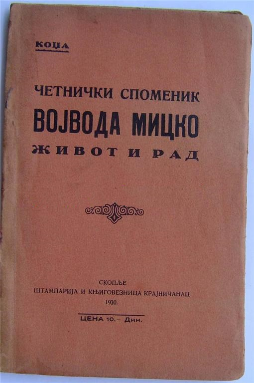 Коџа. Четнички споменик, Војвода Мицко, живот и рад, Скопље, 1930.